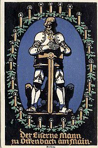 Historische Postkarte Kriegsnagelung Offenbach am Main